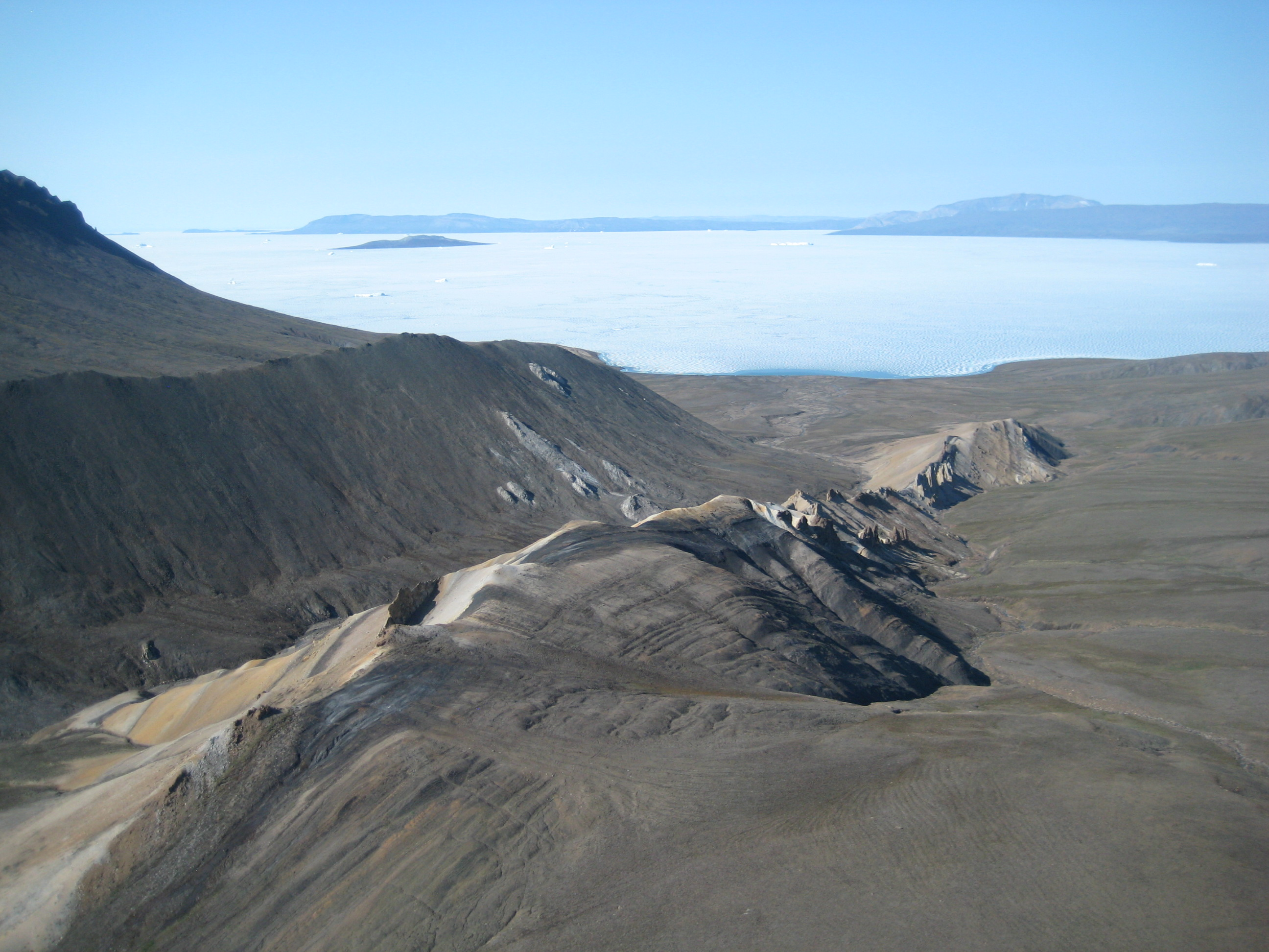 Outcrops - 4